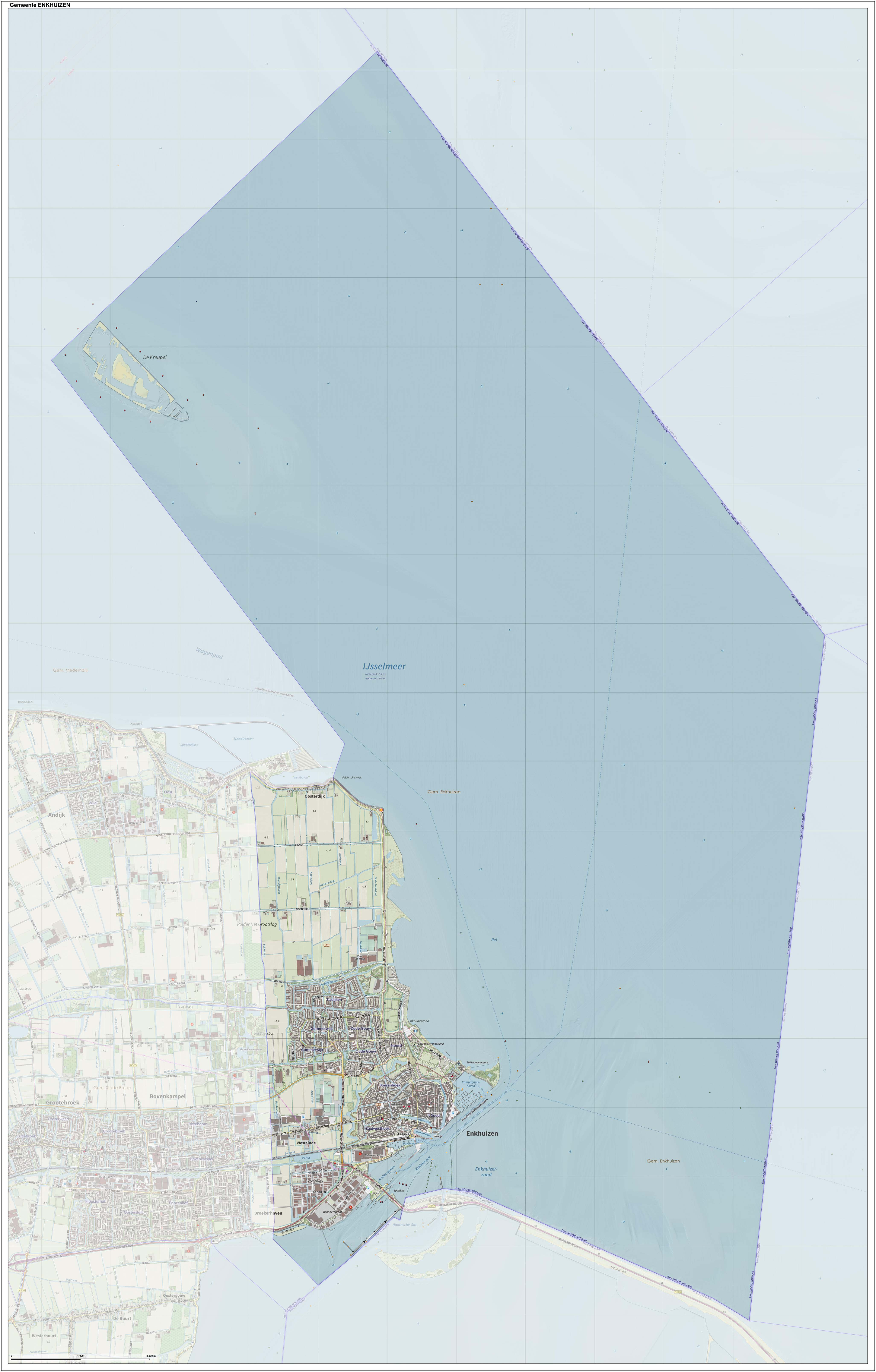 Topografische gemeentekaart. Resolutie: 400 pixels/km. Kaartbeeld samengesteld uit de open geodata van de Top10NL en Top25namen (Kadaster), Creative Commons-BY licentie. Gebouwvlakken uit open geodata BAG extract. Wegen uit de OpenStreetMap, OpenStreetMap community. Reliëfschaduw uit de Actuele Hoogtekaart AHN2. Samenstelling en kleurenschema: Jan-Willem van Aalst, met QGIS. Zie ook de Legenda.